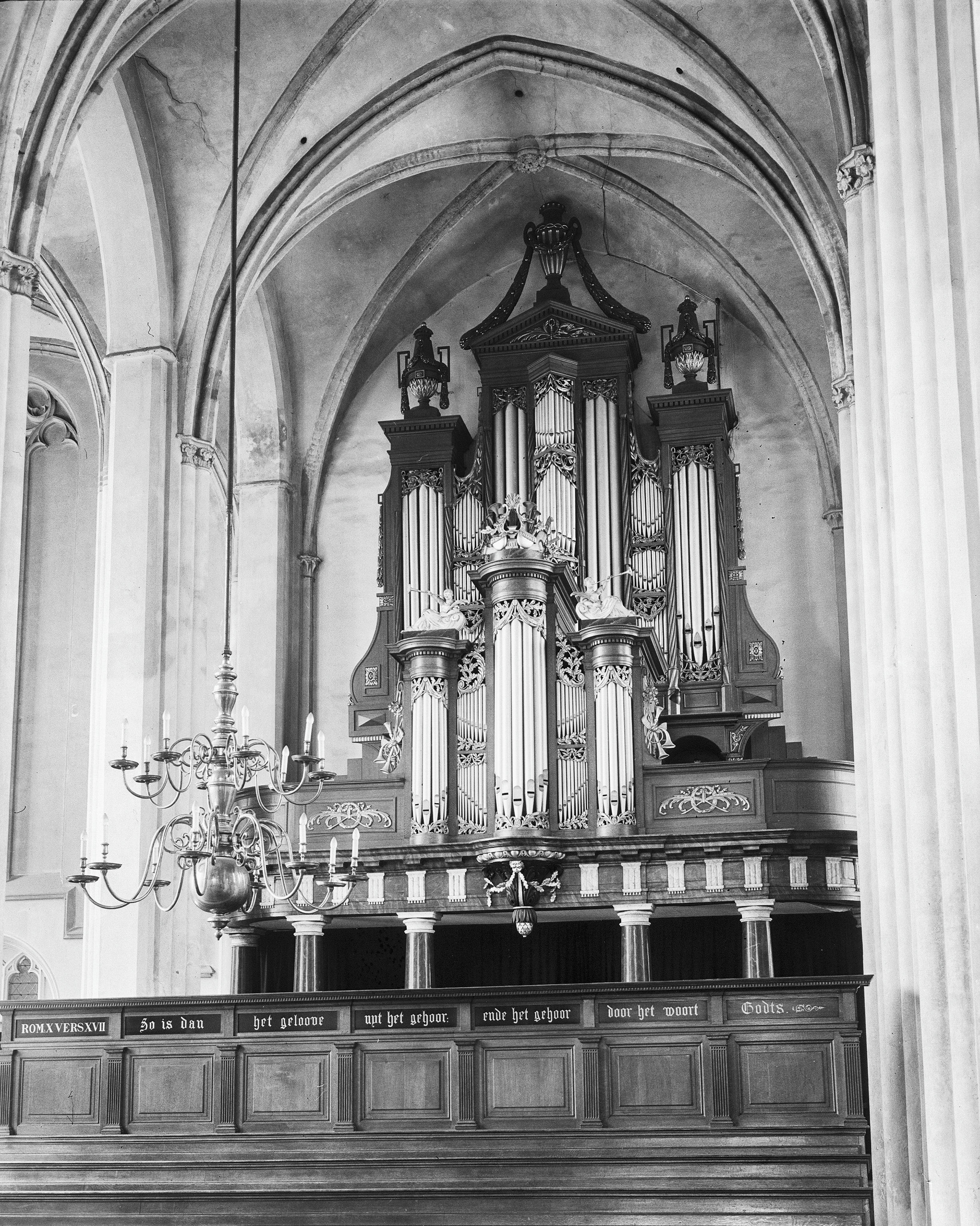 Sint Jacobskerk Of Jacobi Kerk: orgel